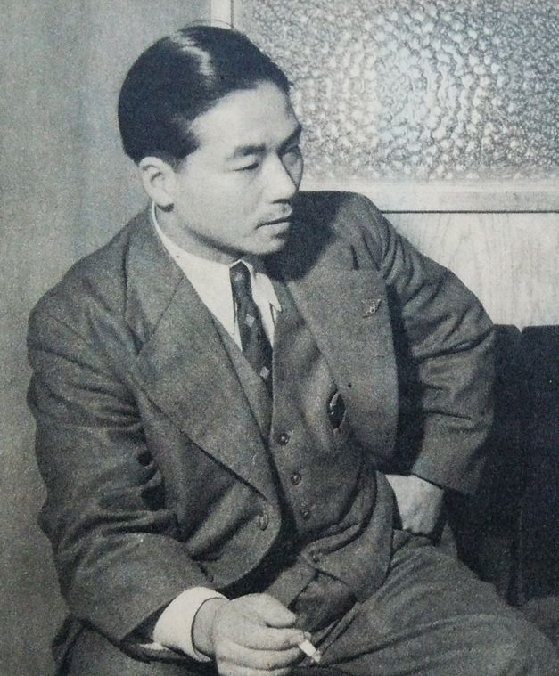 青木春男（青木航空設立者）